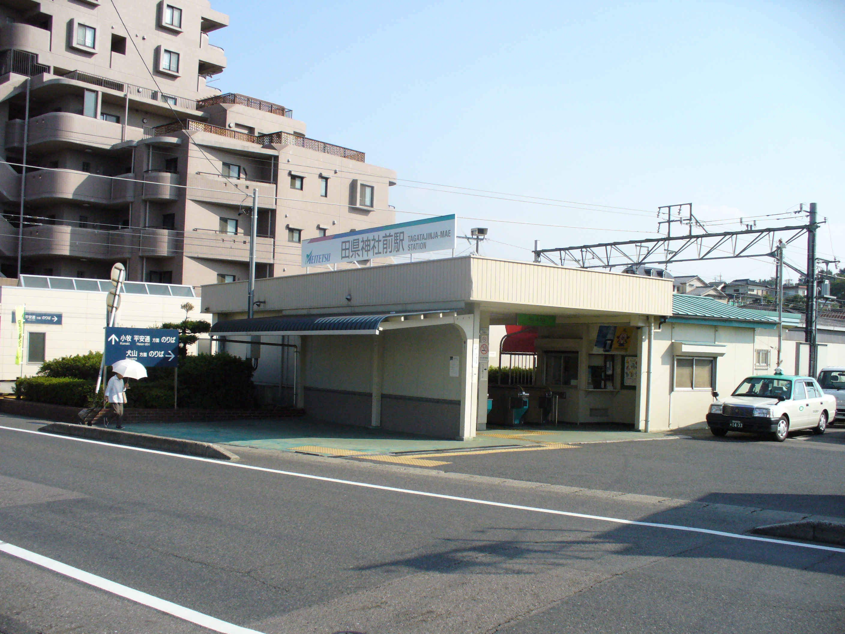 Photograph of Tagata jinja mae eki,taken in Komaki city, Aichi, Japan.